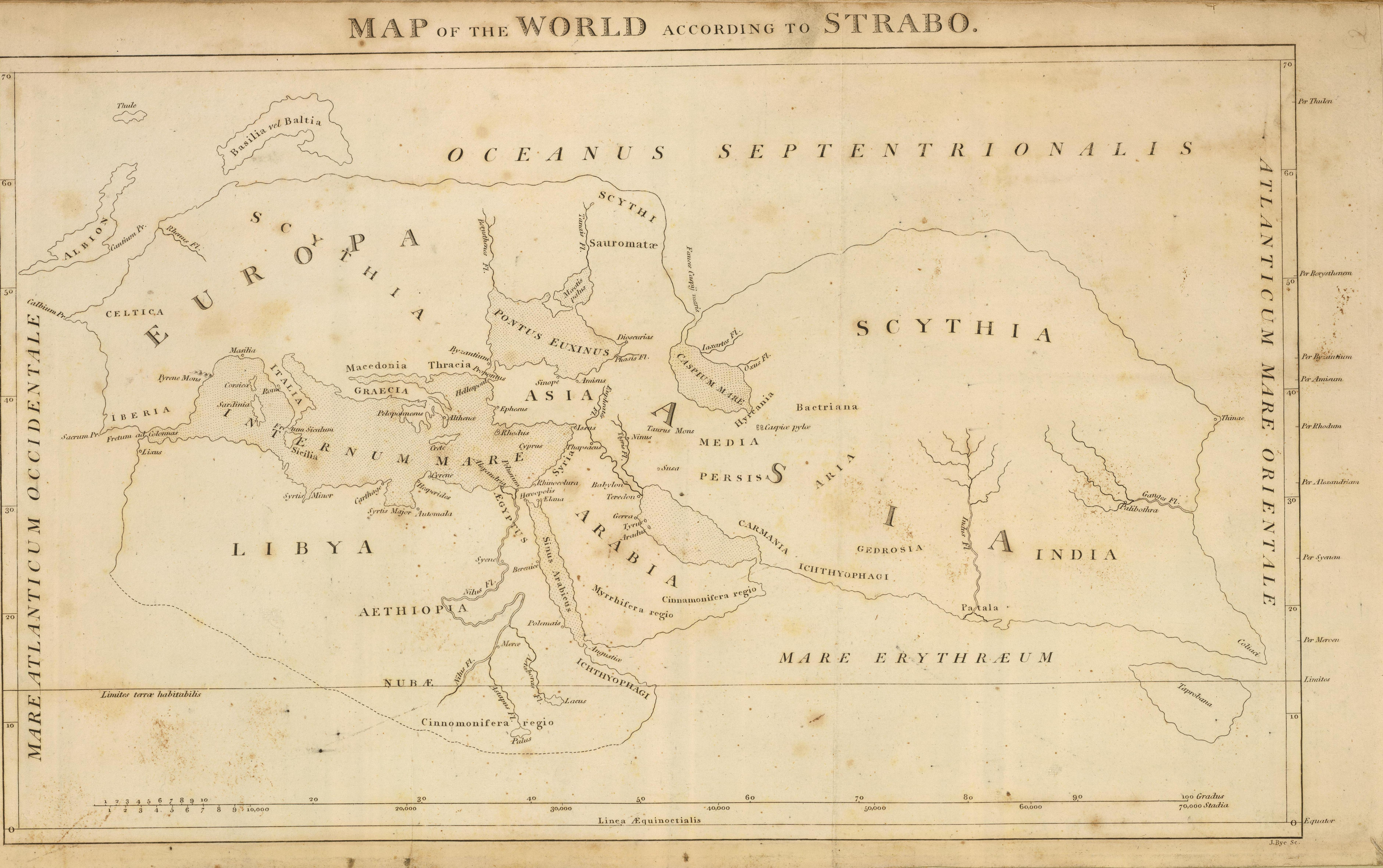 Map of the World According to Strabo (1814). Bye, J., engraver.